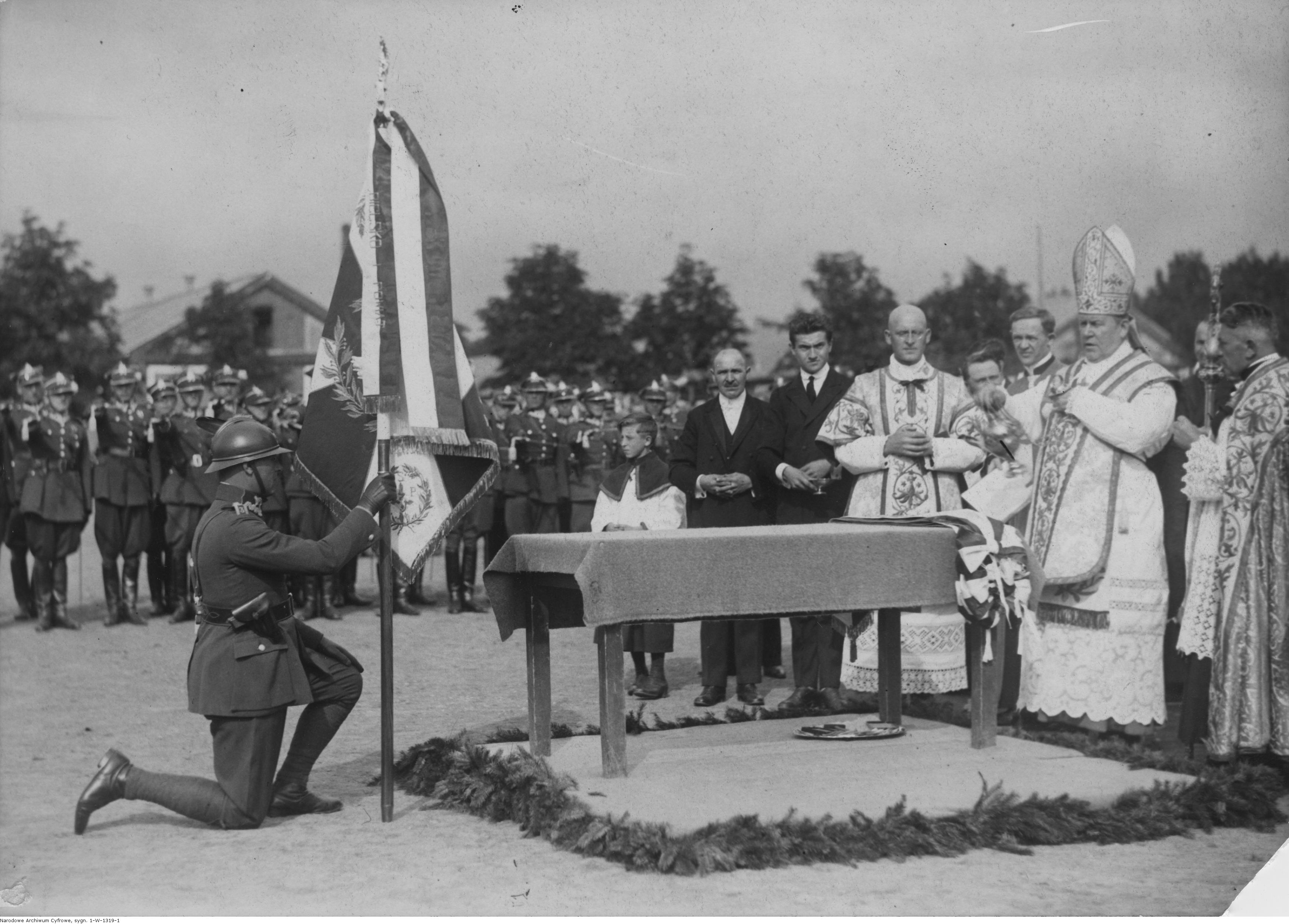 Wręczenie sztandaru 3 Pułkowi Strzelców Podhalańskich w Bielsku - bp polowy Stanisław Gall poświęca sztandar pułku; październik 1927 r. Koncern Ilustrowany Kurier Codzienny - Archiwum Ilustracji. Sygnatura: 1-W-1319-1